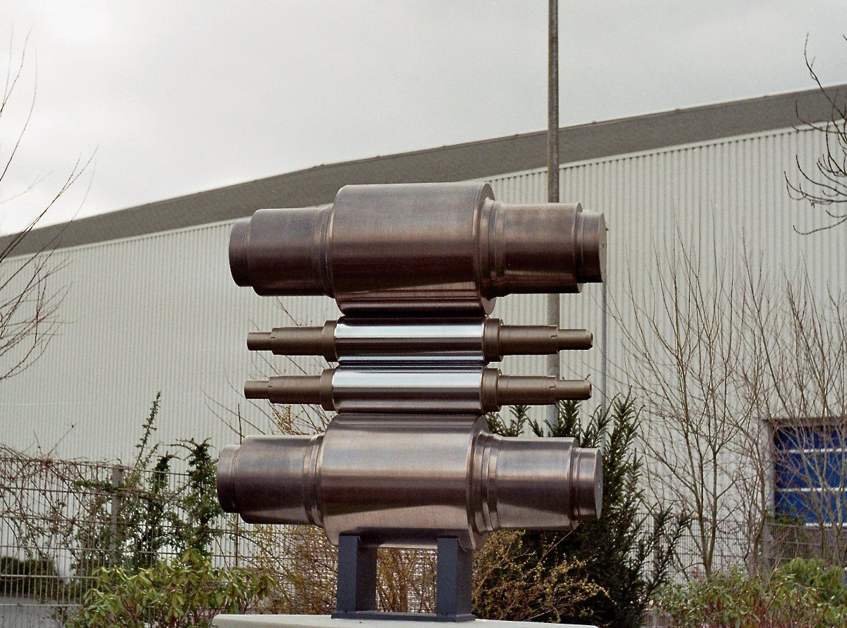 Anordnung zweier Werkzeug- und zweier Stützwalzen zu Kaltwalzen von Stahlprofilen